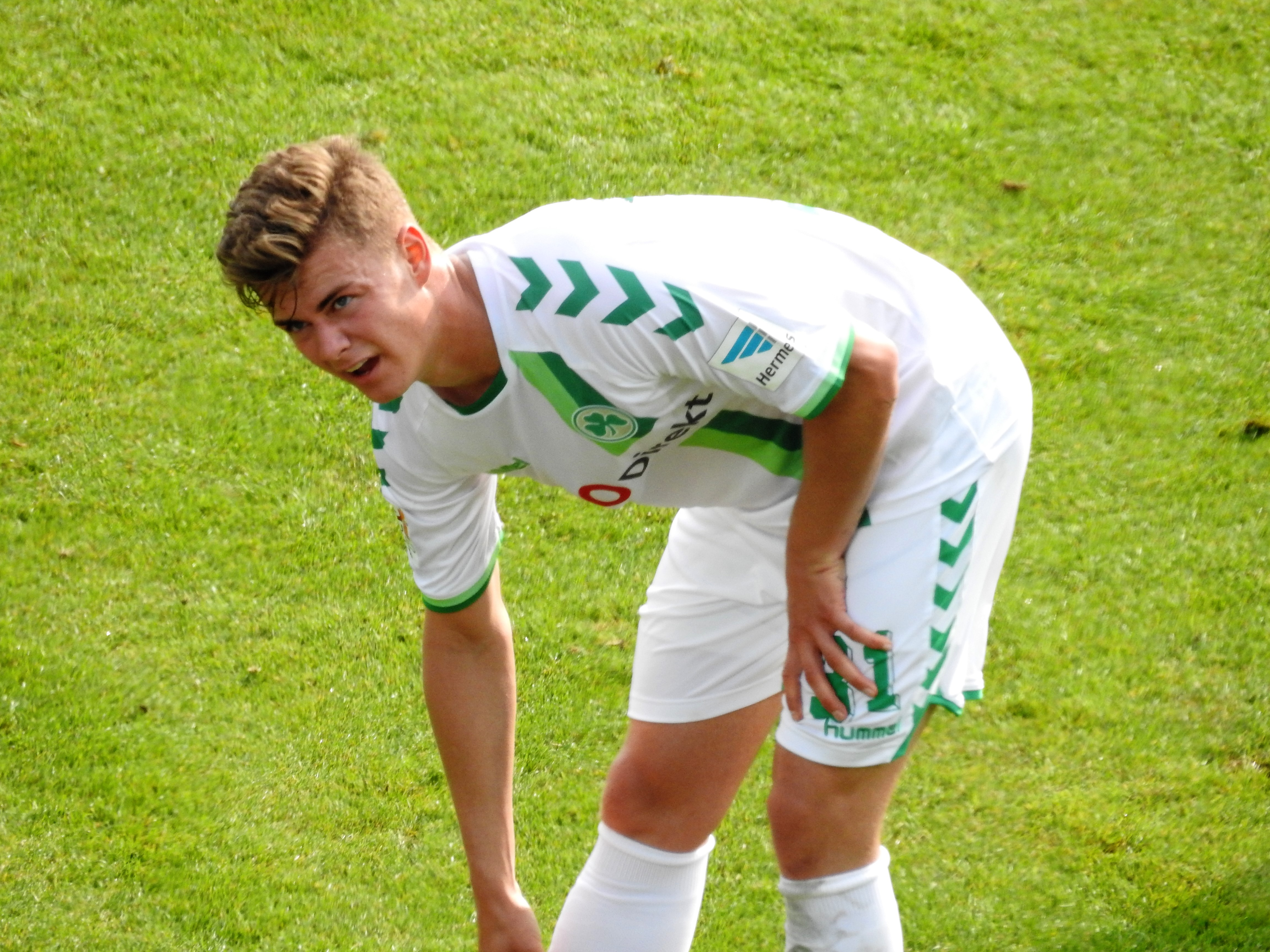 Daniel Steininger SpVgg Greuther Fürth